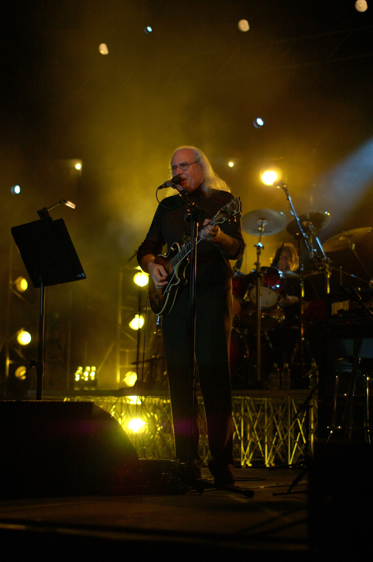 Franco Mussida in concerto con la PFM a Modena il 25/07/2007